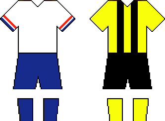 Uniformes característicos de Nacional y Peñarol, clubes que disputan el Superclásico del fútbol uruguayo